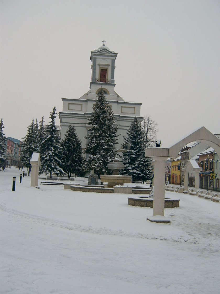 Kirche in Poprad in der Fußgängerzone This medium shows the protected monument with the number 706-841/0 in the Slovak Republic.